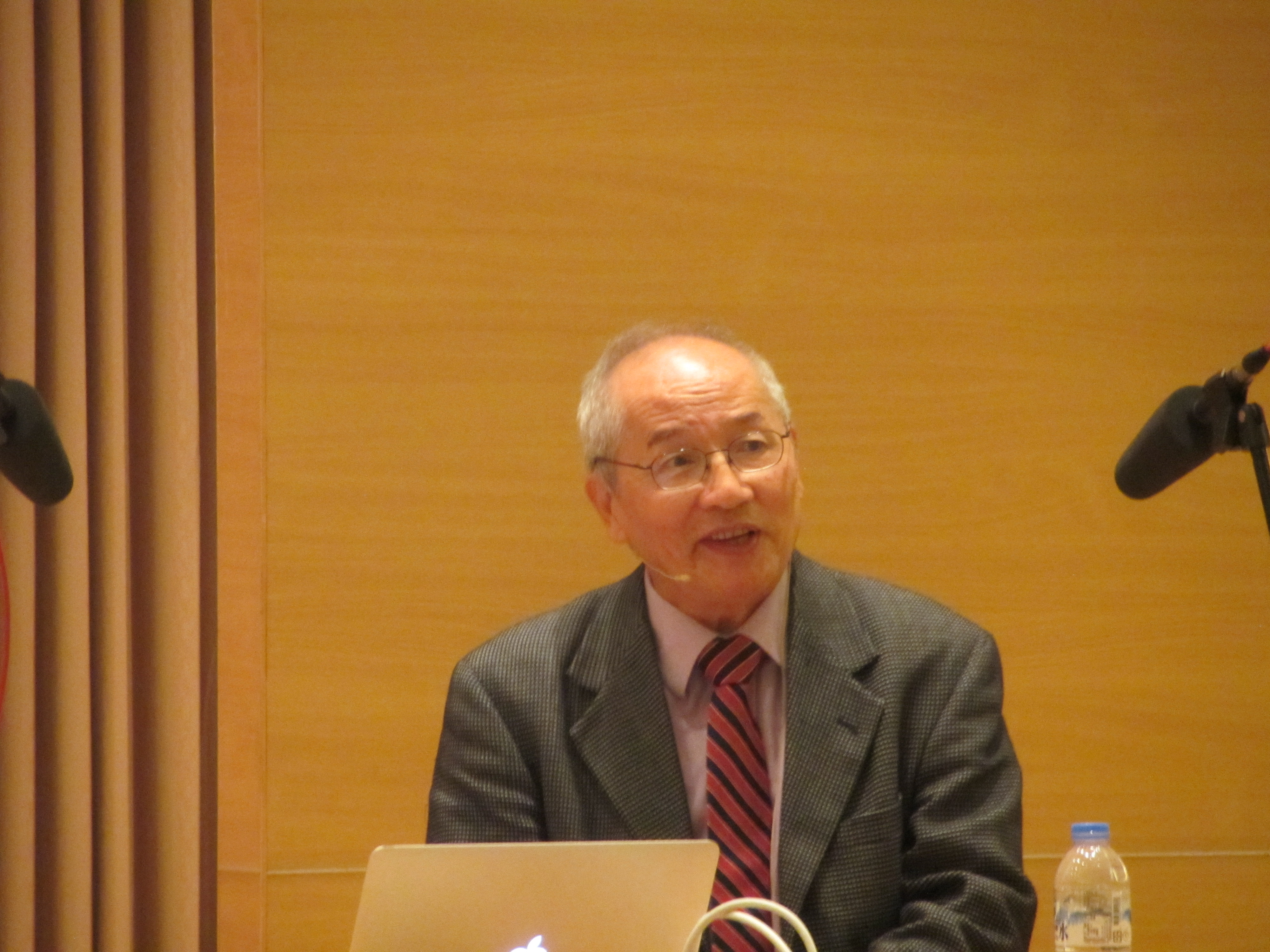 演講中的美籍華人天文學家，中央研究院院士徐遐生。